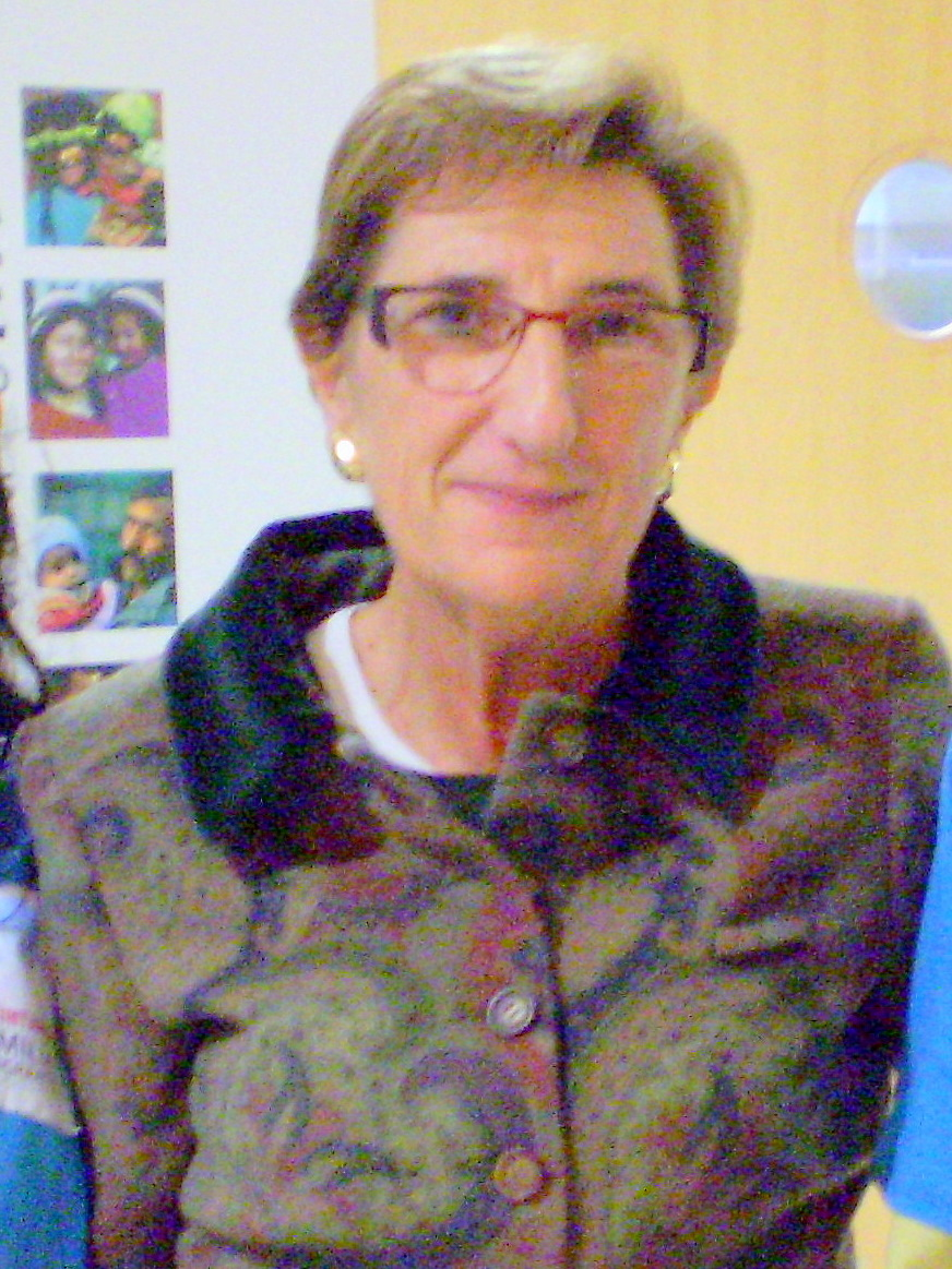 Gotzone Mora despues de haber participado como conferencista en el Primer Encuentro de Familias Inmigrantes convocado por la Iglesia de Valencia